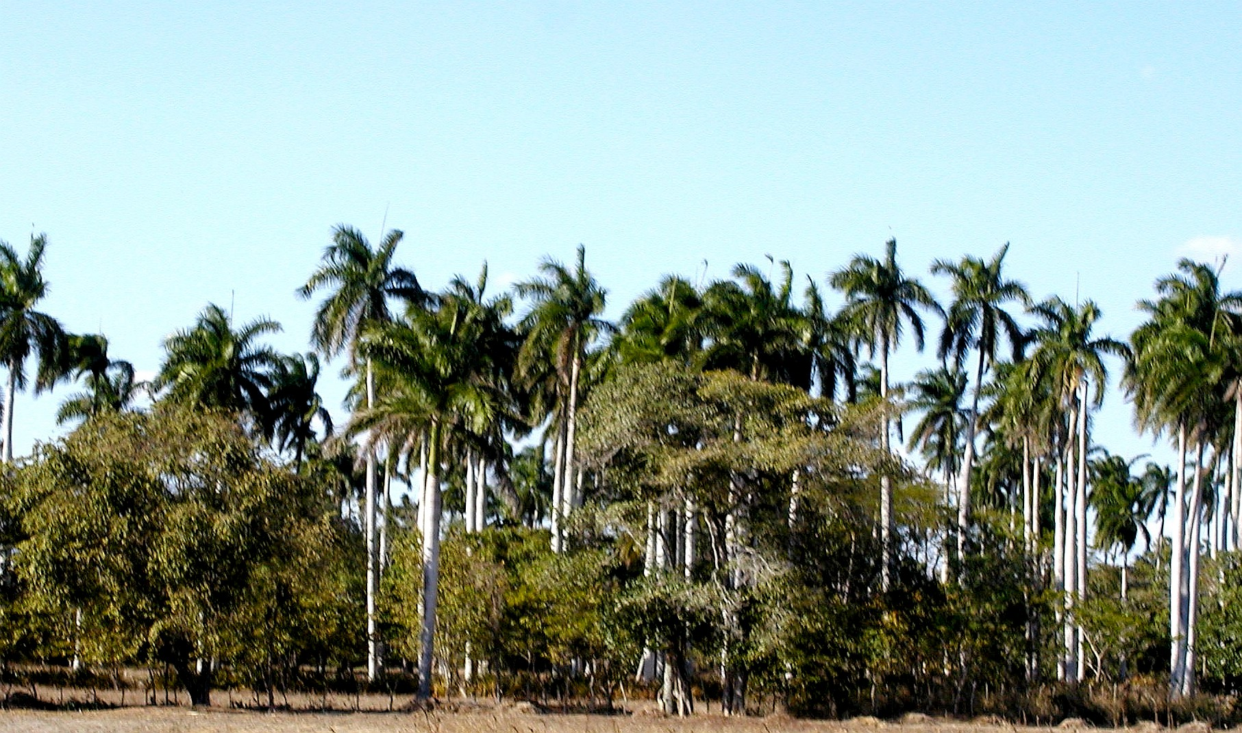 Vegetacion tipica co palma real en el area del pueblo de Guayacanes, Cuba, la linea de palmas reales es tipica en todo el recorrido del rio Naranjo, Foto tomada en Febrero del 2004